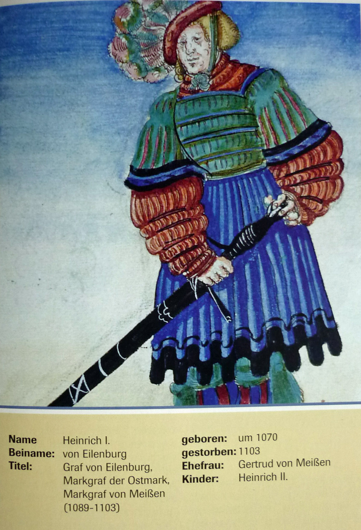 Heinrich I. von Eilenburg (1089–1103) Markgraf der Ostmark, Markgraf von Meißen (aus der Spalatin-Chronik, um 1520)